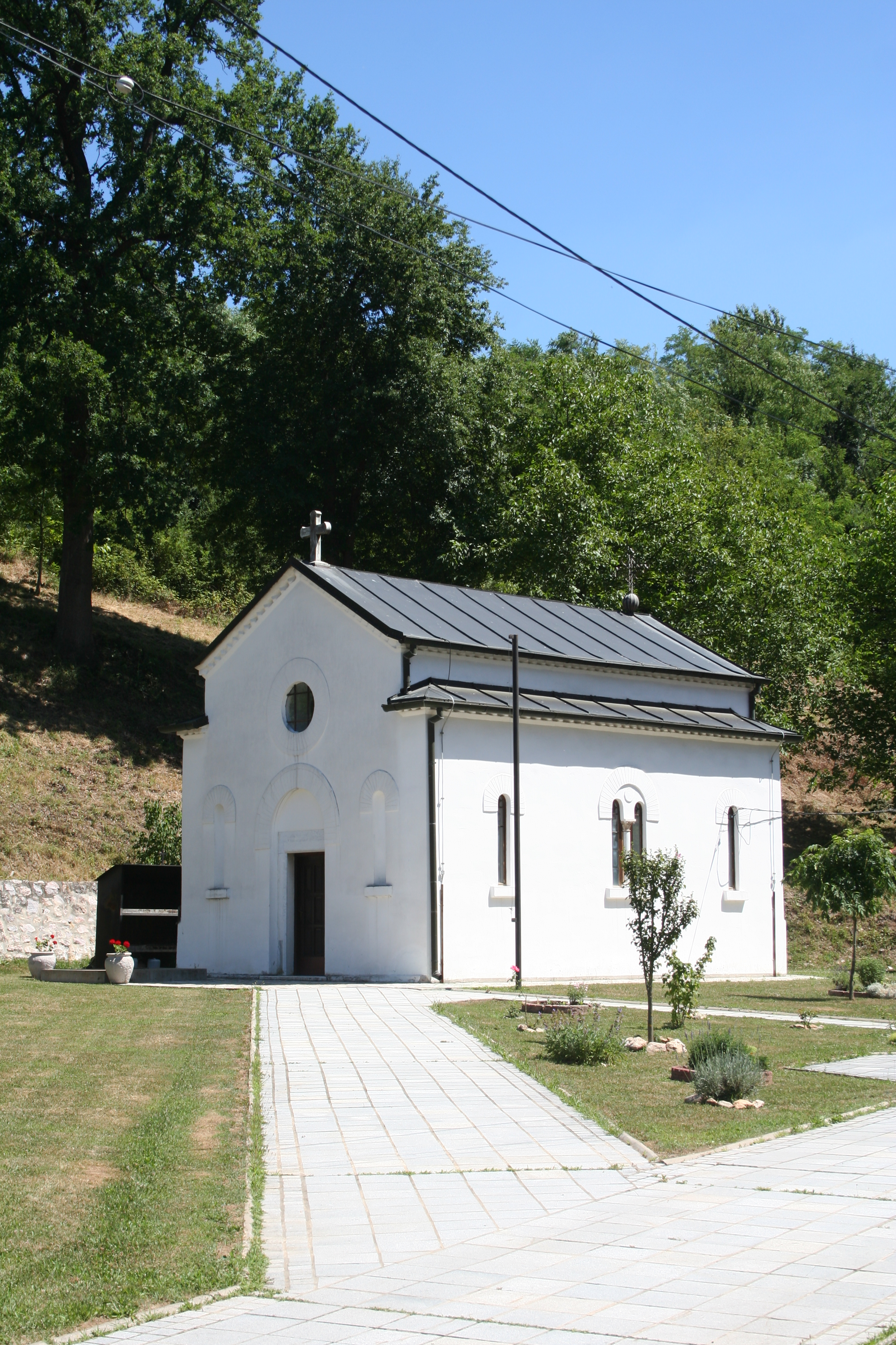 Spomen crkva Sv. Đorđa manastira Ćelije